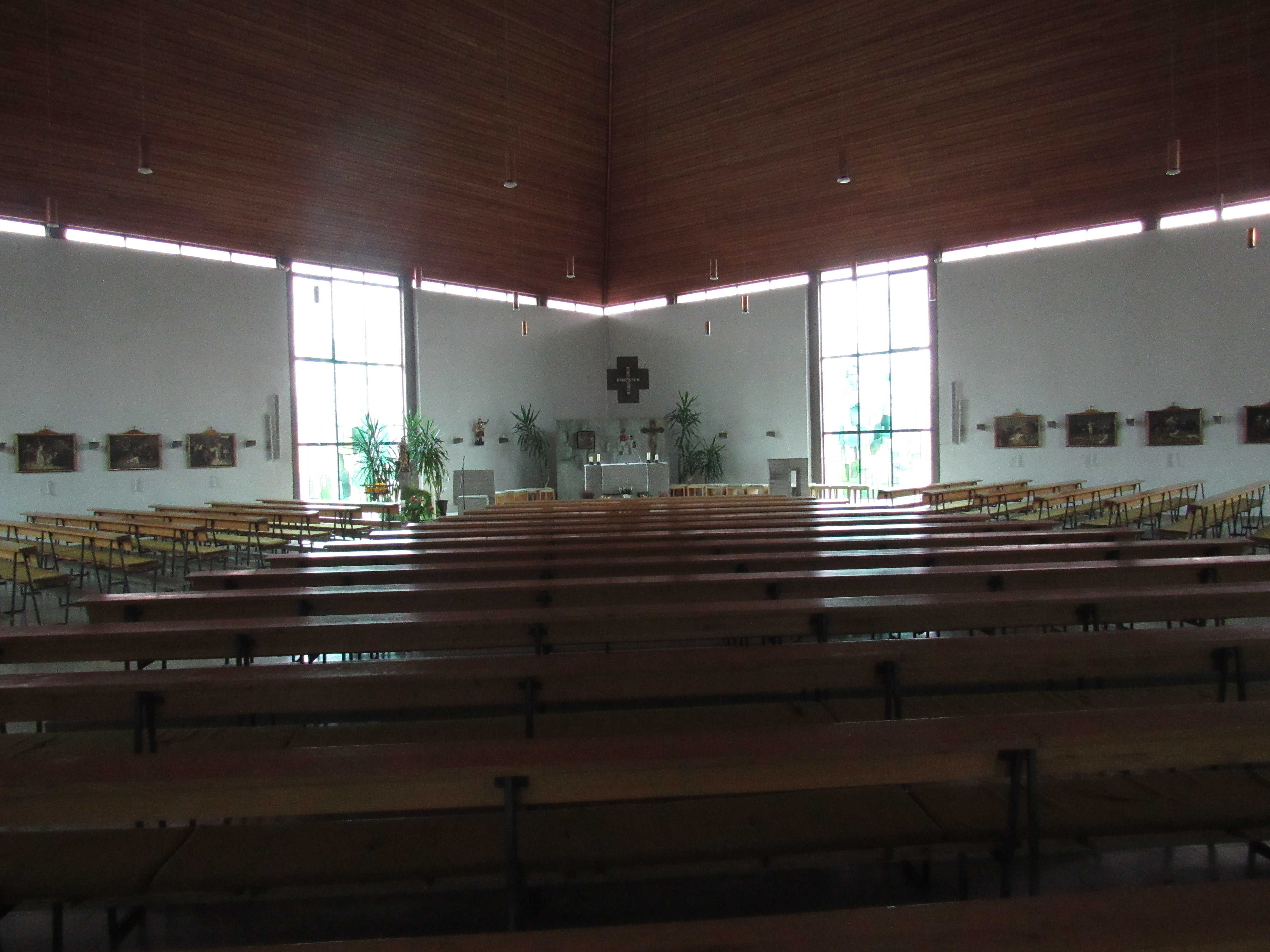 Inneneraum der neuen St.-Georgs-Kirche in Diebach